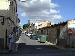 Calle Ramon Llull (Pont d'Inca)